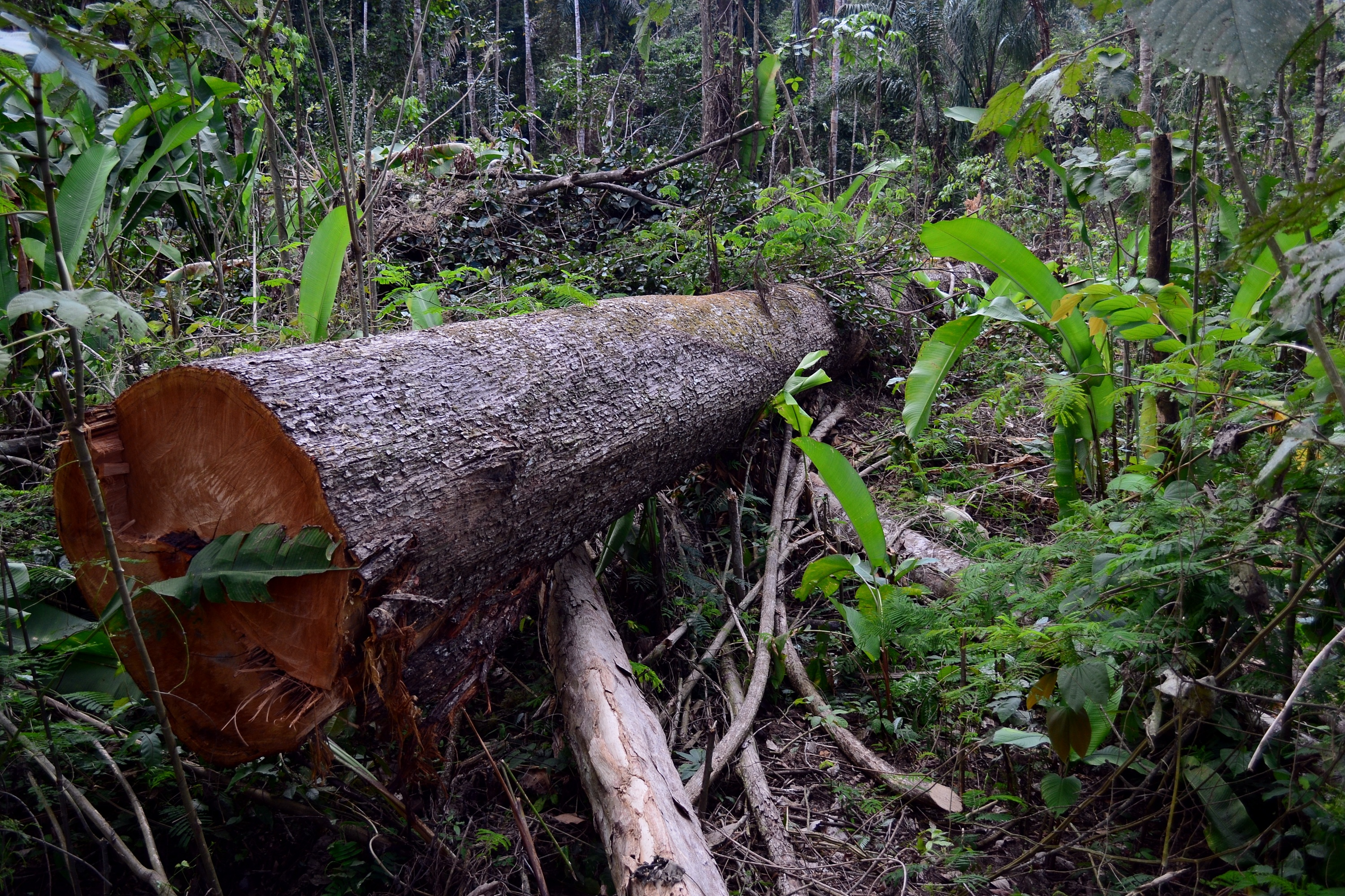 Tronco derrubado por desmatadores na Floresta Nacional do Jamanxim em Novo Progresso, Pará. Foto: Vinícius Mendonça - Ascom/Ibama.